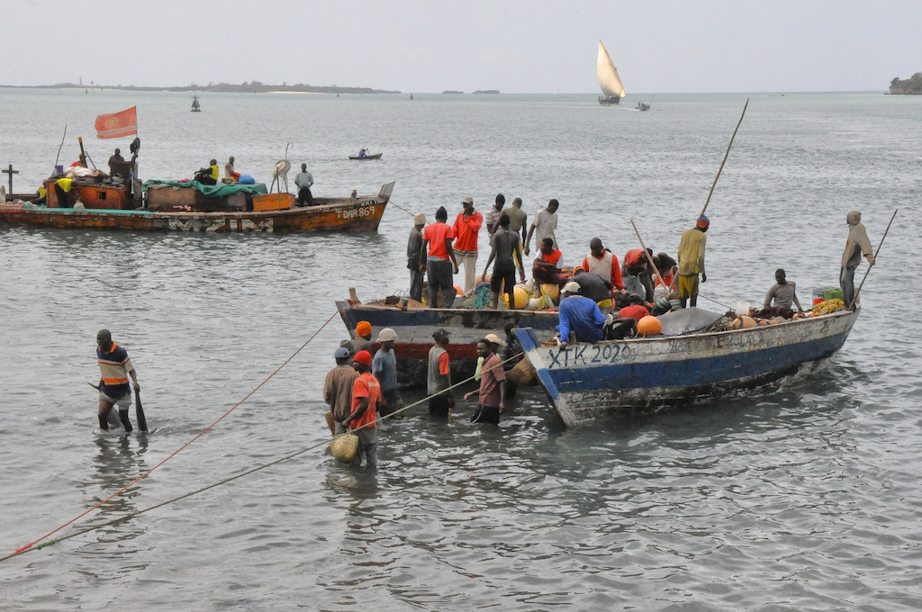 Fishermen, Tanzania